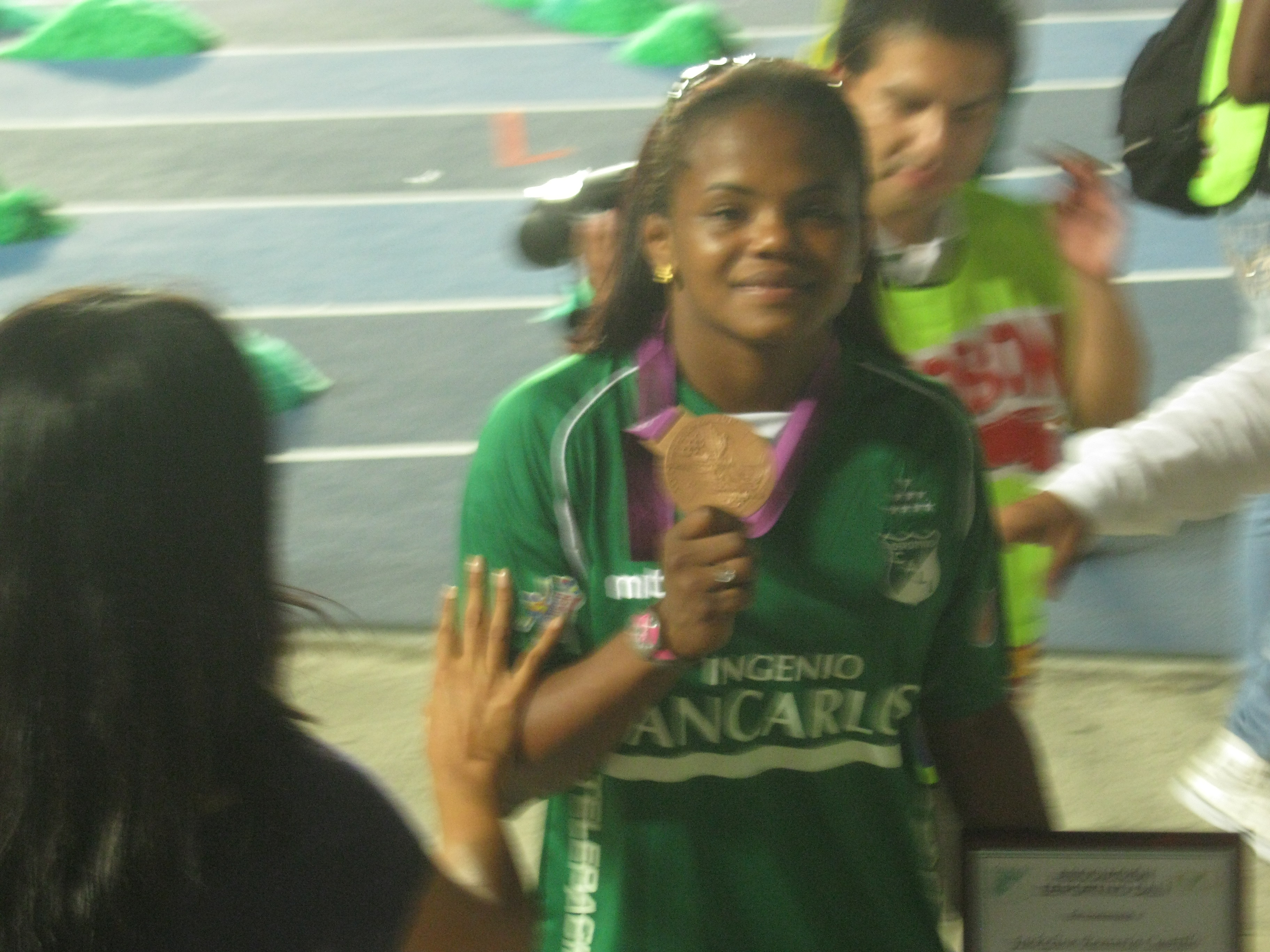 El Glorioso Deportivo Cali vs junior. 4 fecha.